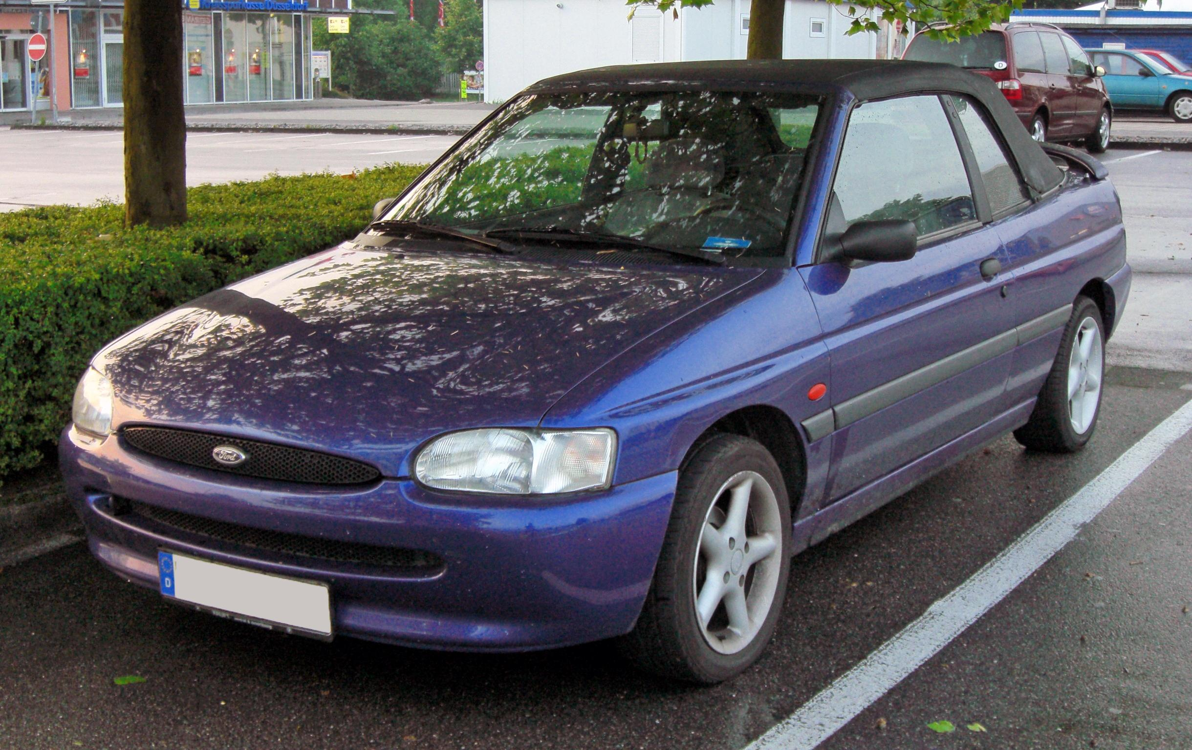 Ford Escort Cabriolet